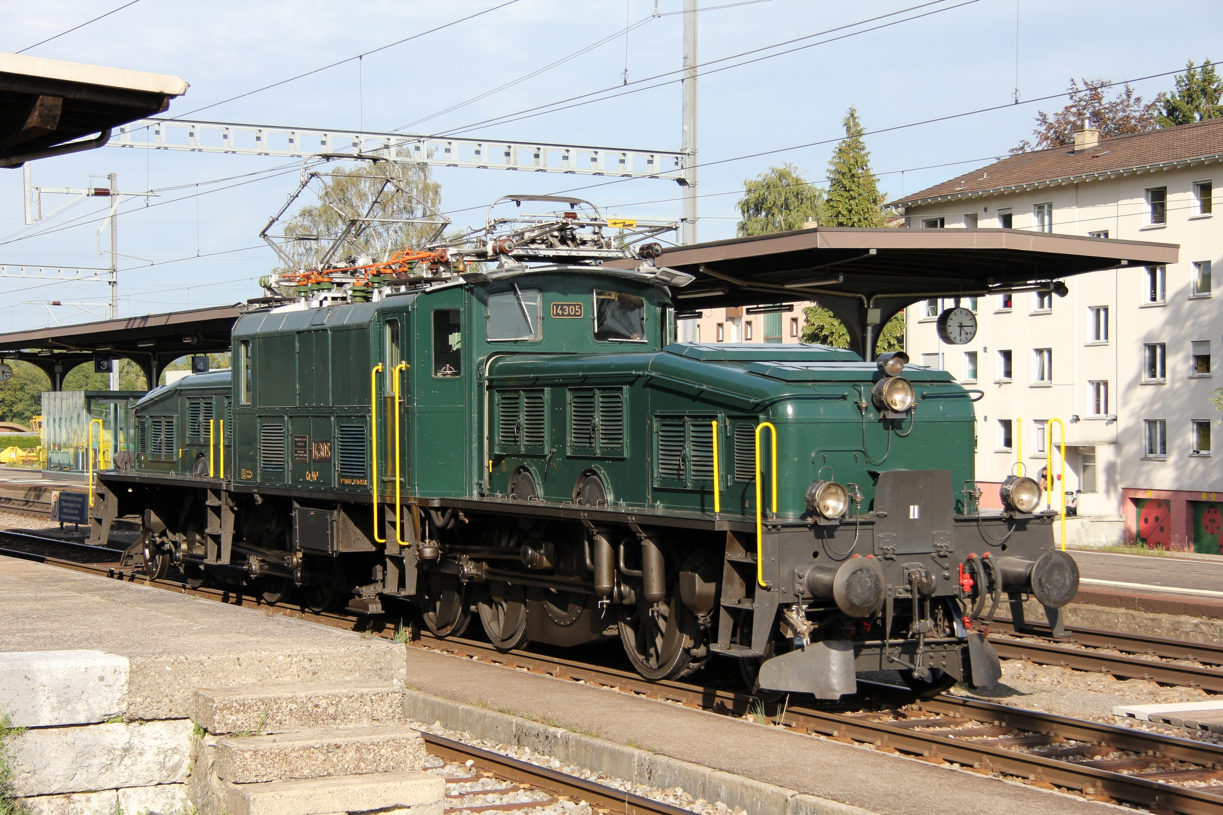 La Ce 6/8 III 14305 de CFF Historic. Train 38074 Olten - Oensingen.